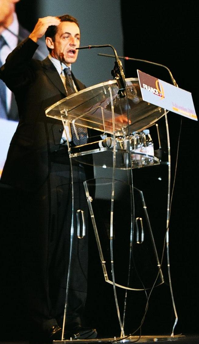 Nicolas Sarkozy